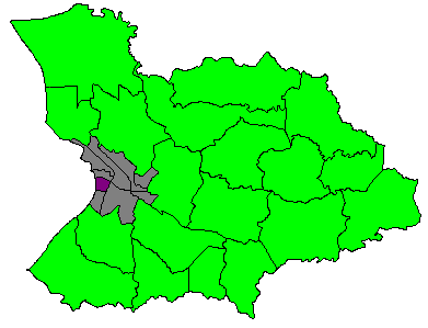 Comunidad Dulces Labios, ubicada en el Barrio Marina Meridional (Mayagüez Urbano) de Mayagüez, Puerto Rico.